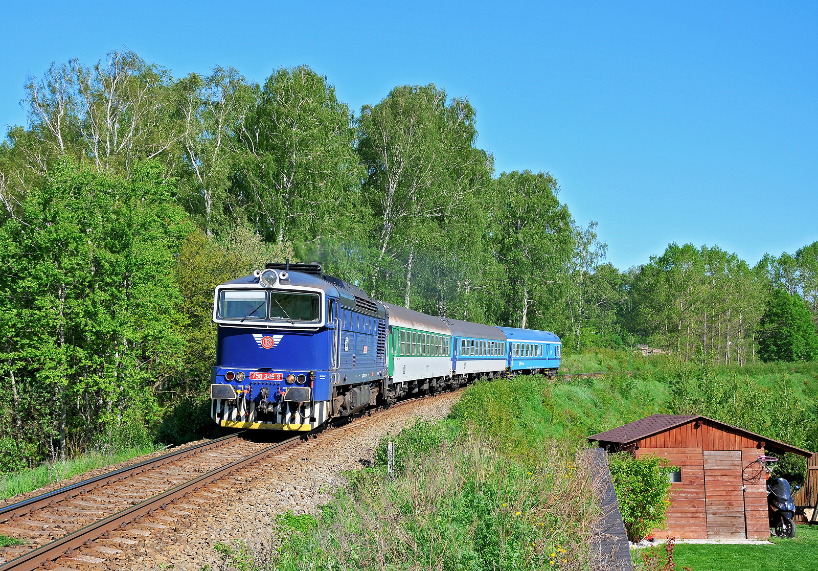 Motorová lokomotiva 750.346 Českých drah v Krásné Studánce.